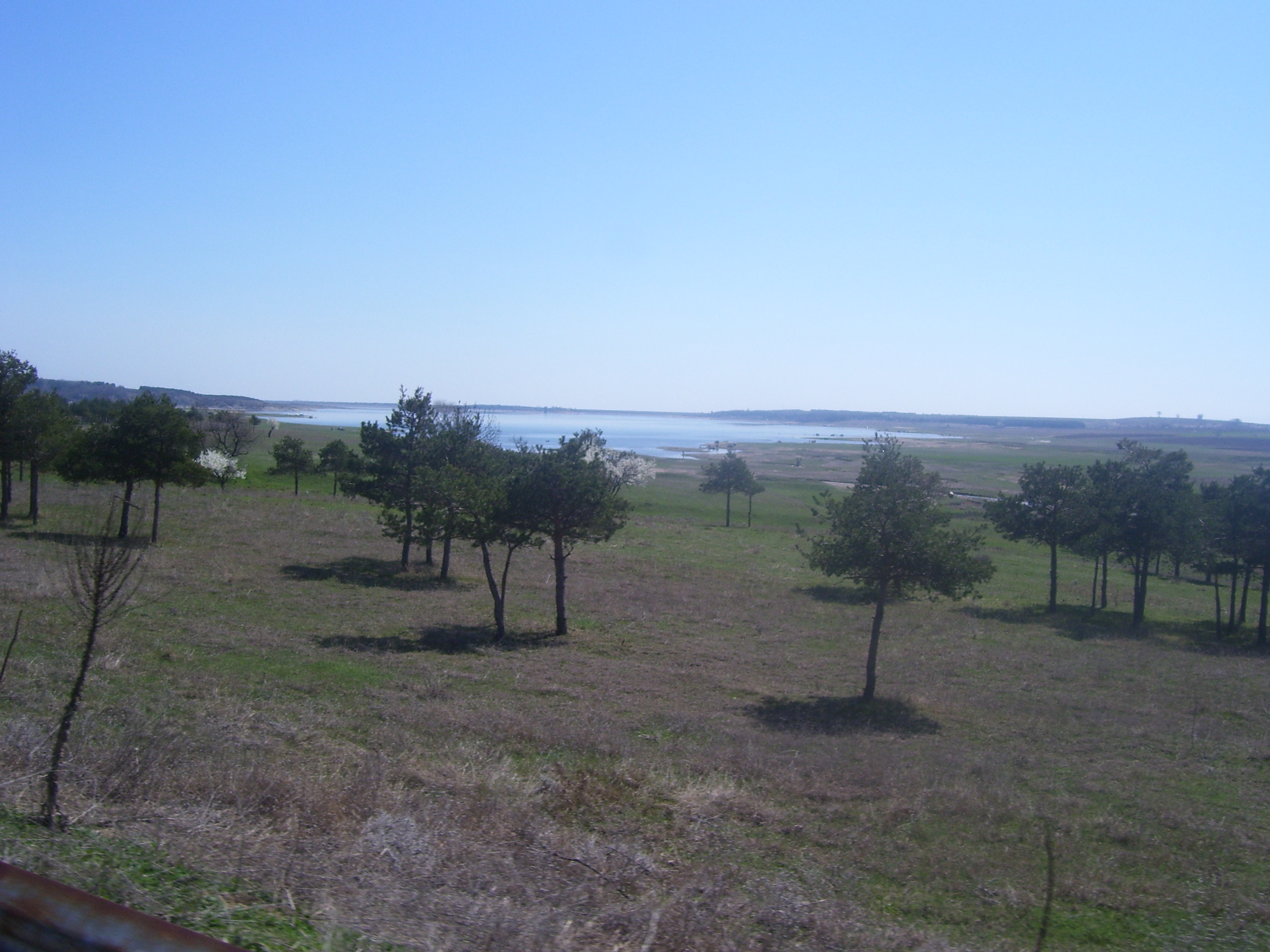 Язовир Пясъчник.